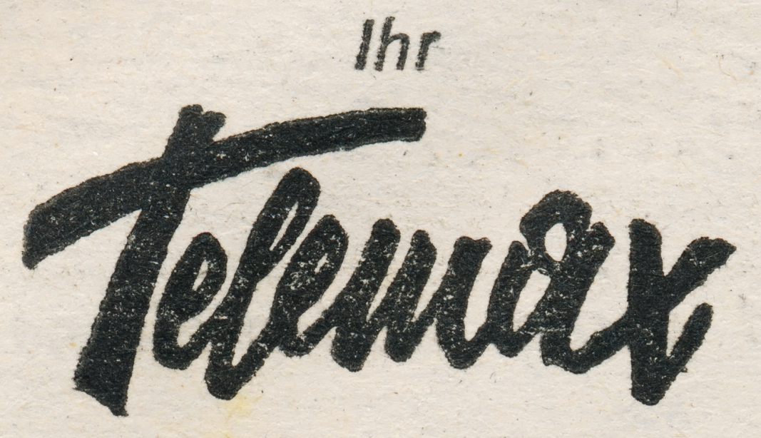 Unterschrift einer Telemax-Kolumne von Robert Löffler